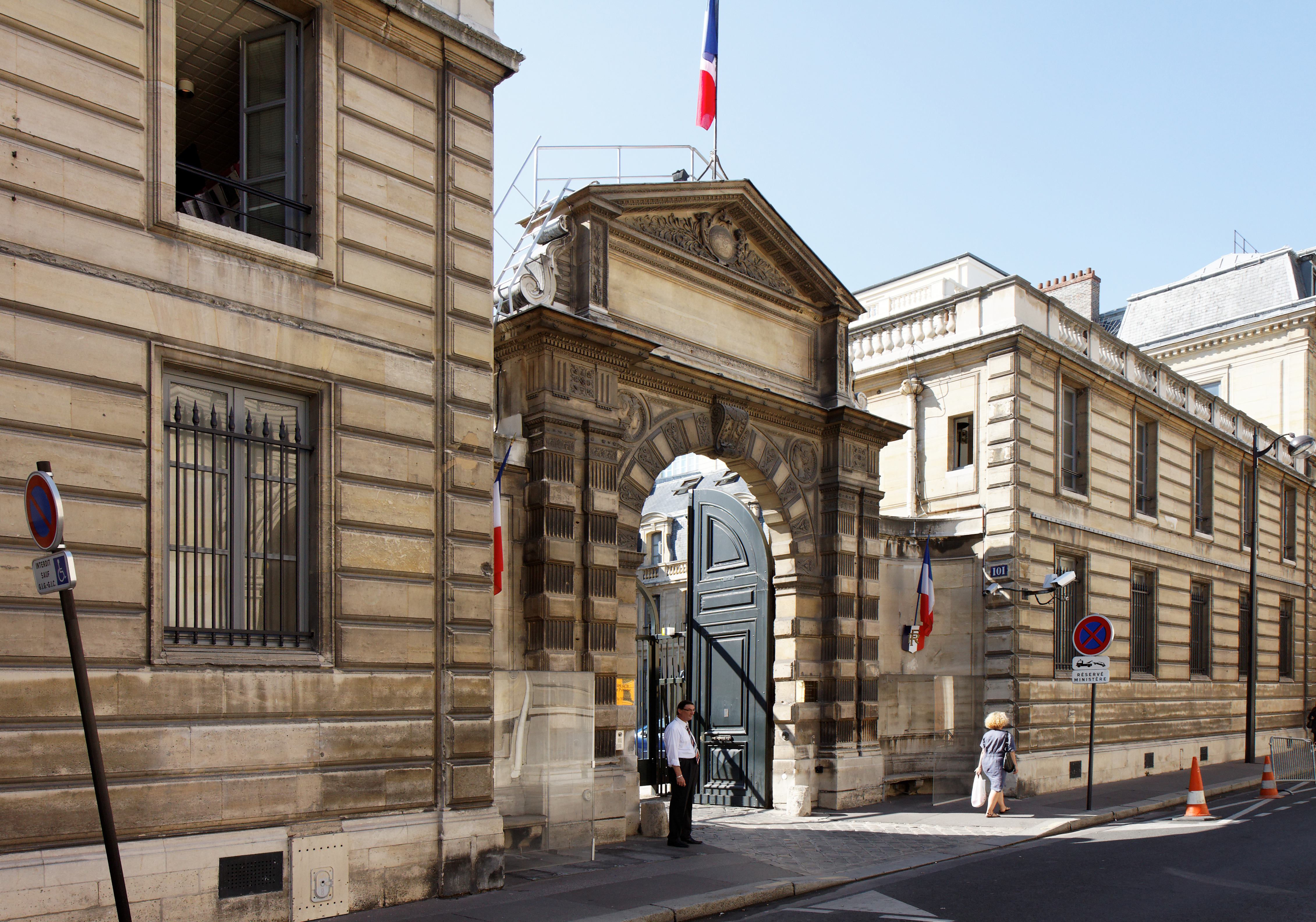 Un monument historique dans le 7ème arrondissement de Paris.